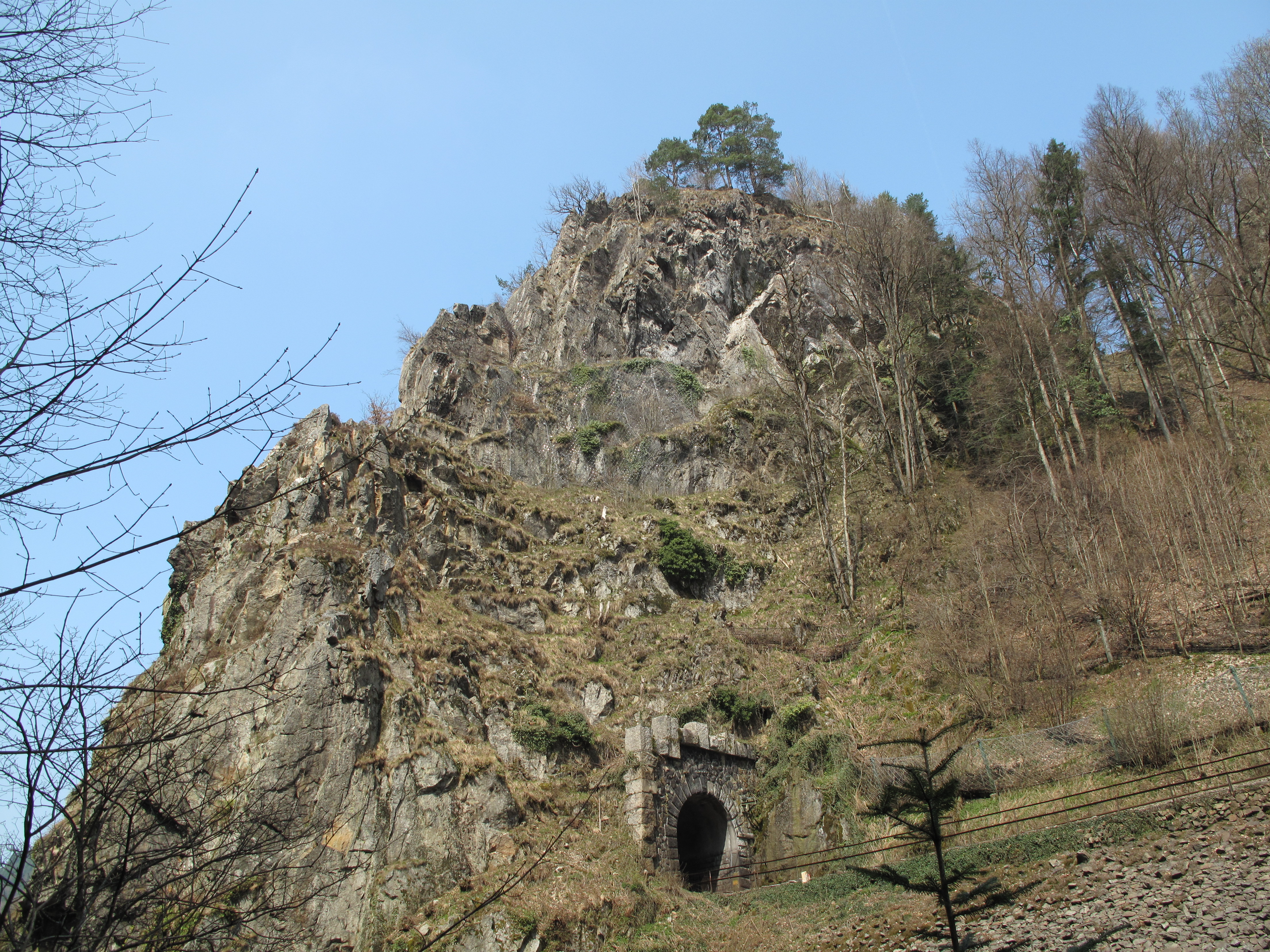 Der vom Falkensteintunnel der Höllentalbahn durchbrochene Burgfelsen - Ausblick vom Jägerpfad.